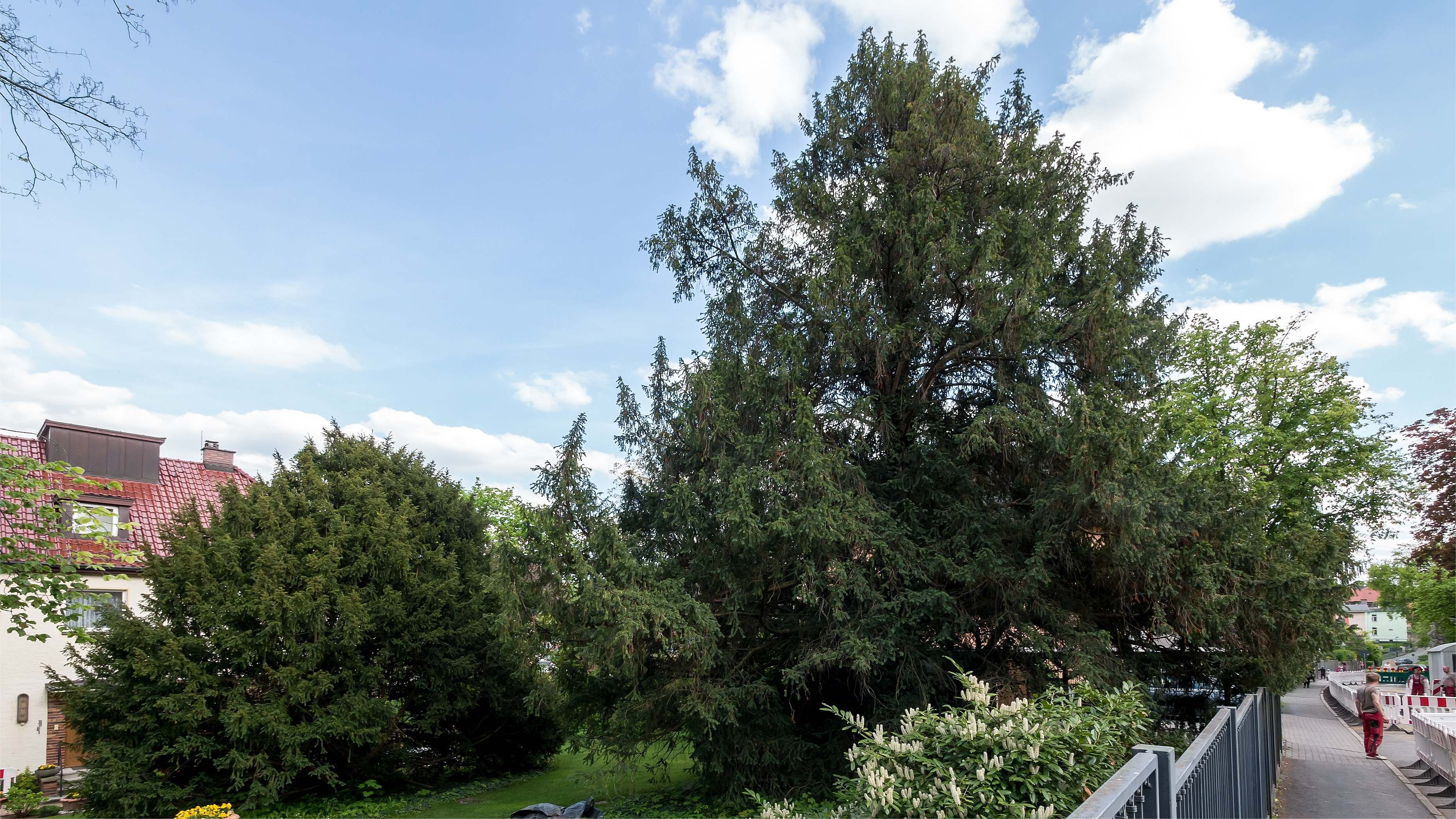 Eibe Doc.-Nr. 1963-06 Jena I